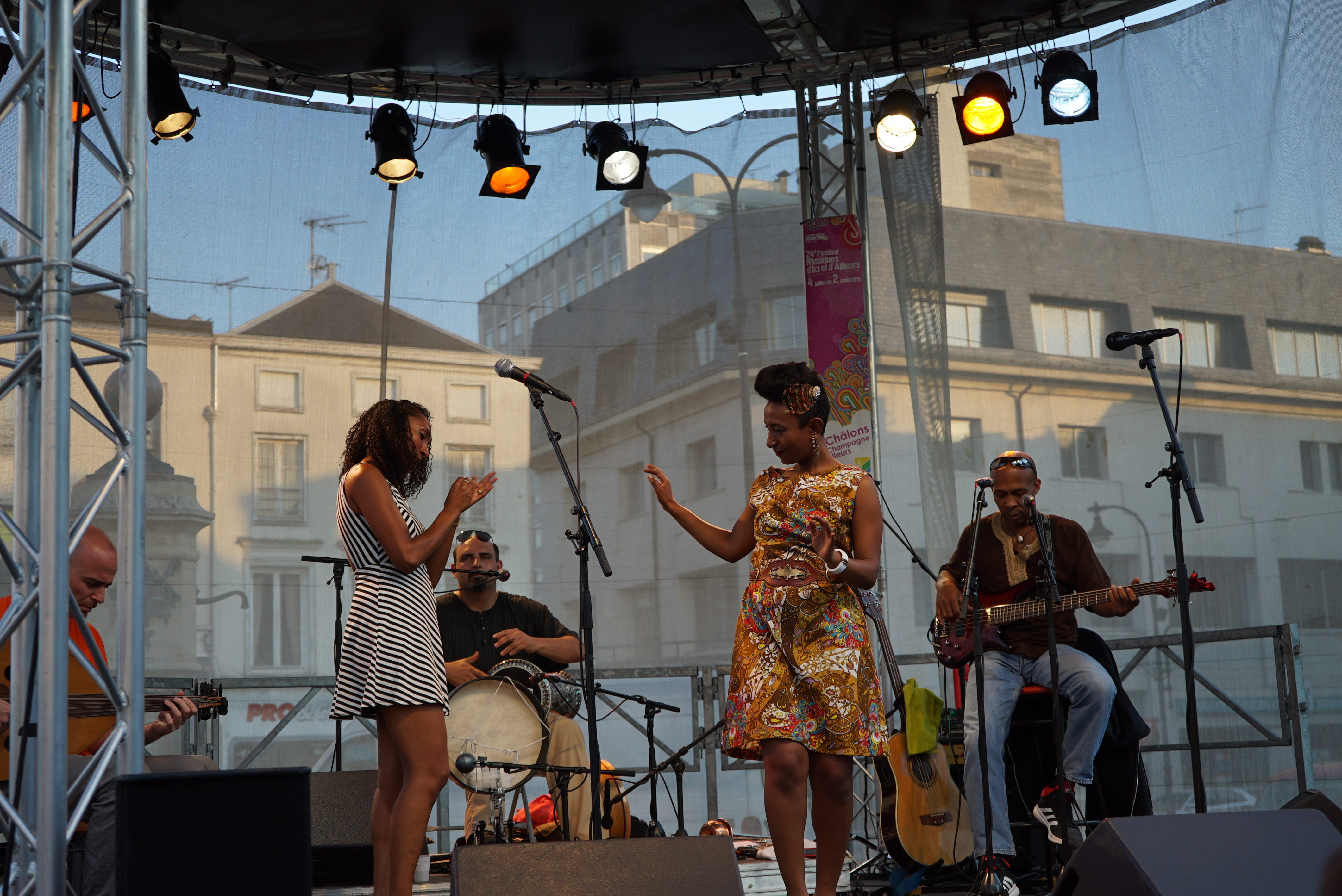 Alsarah lors du Musiques d'Ici et d'Ailleurs 2015.